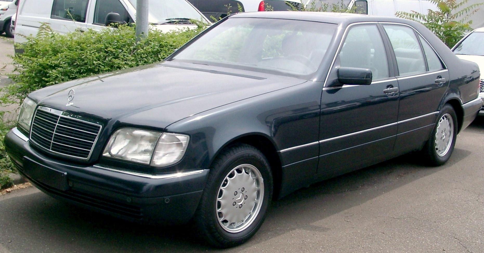 Mercedes-Benz Baureihe 140